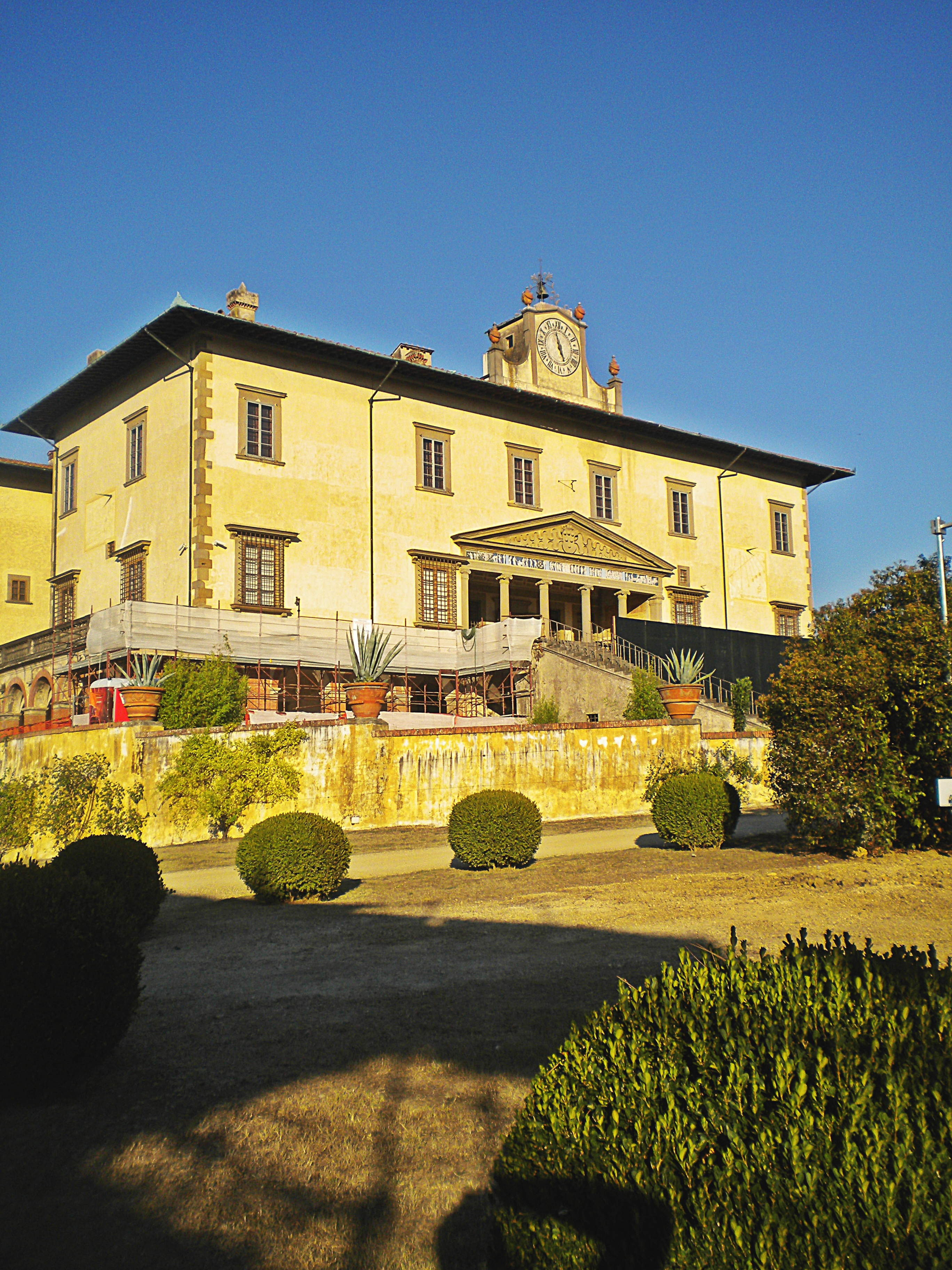 villa